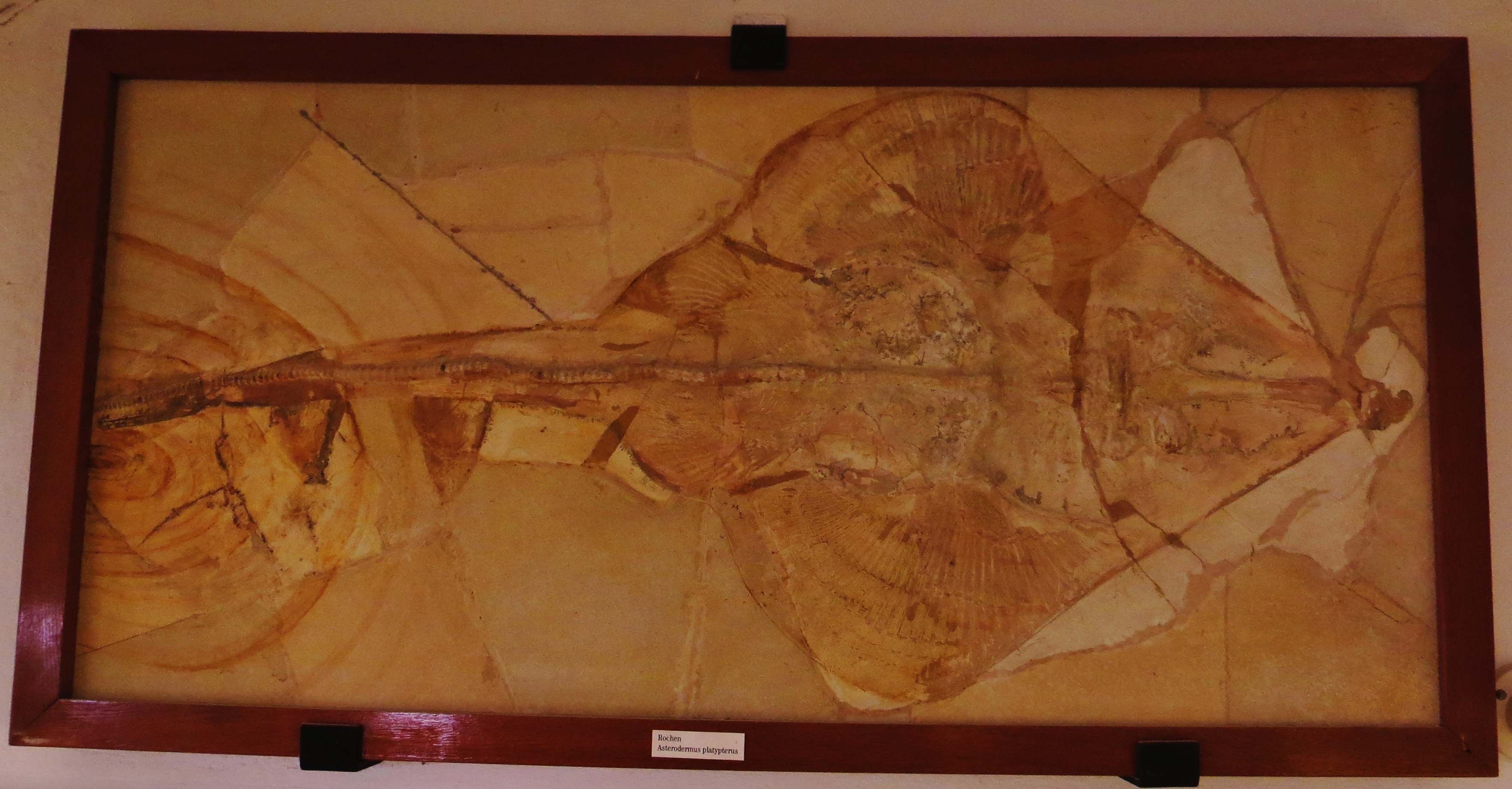 Took the picture at Museum Berger, Eichstaett